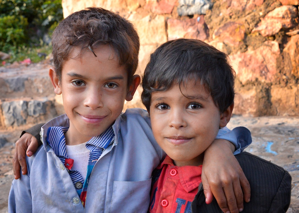 Boys in Mahweet, Yemen